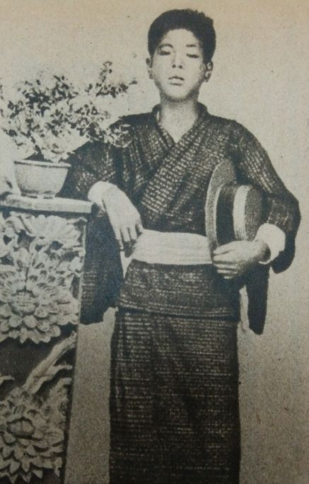 安部磯雄